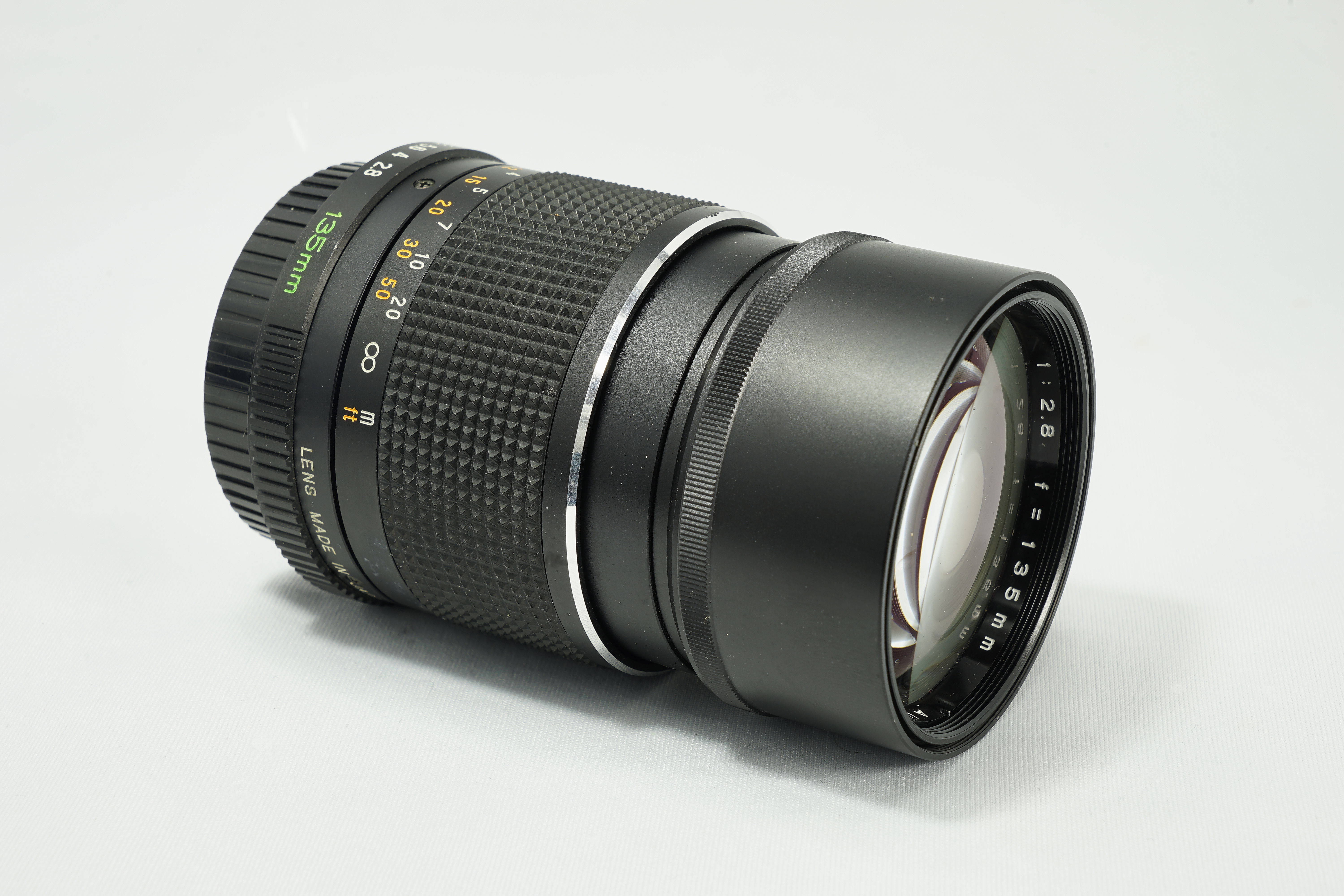 Auto Mamiya-Sekor CS f2.8 135 mm